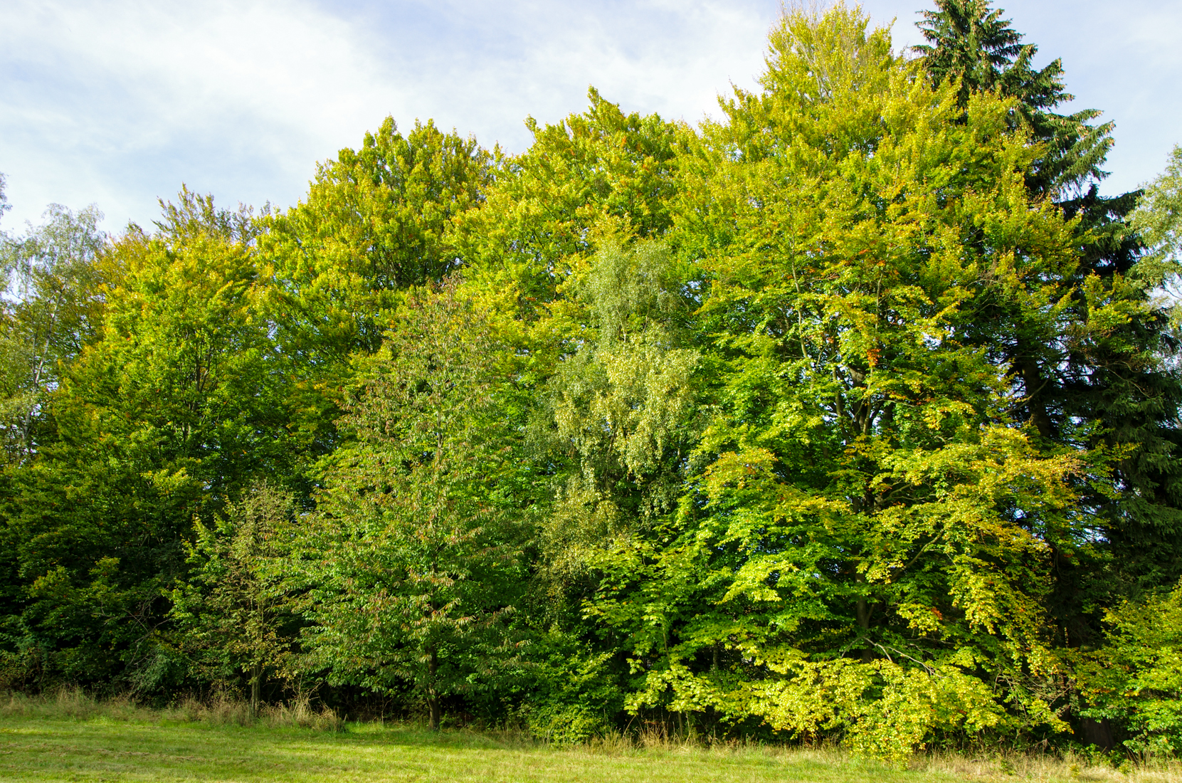 Památné stromy - Buková alej v ulici Pod Lesem, Nejdek okres Karlovy Vary